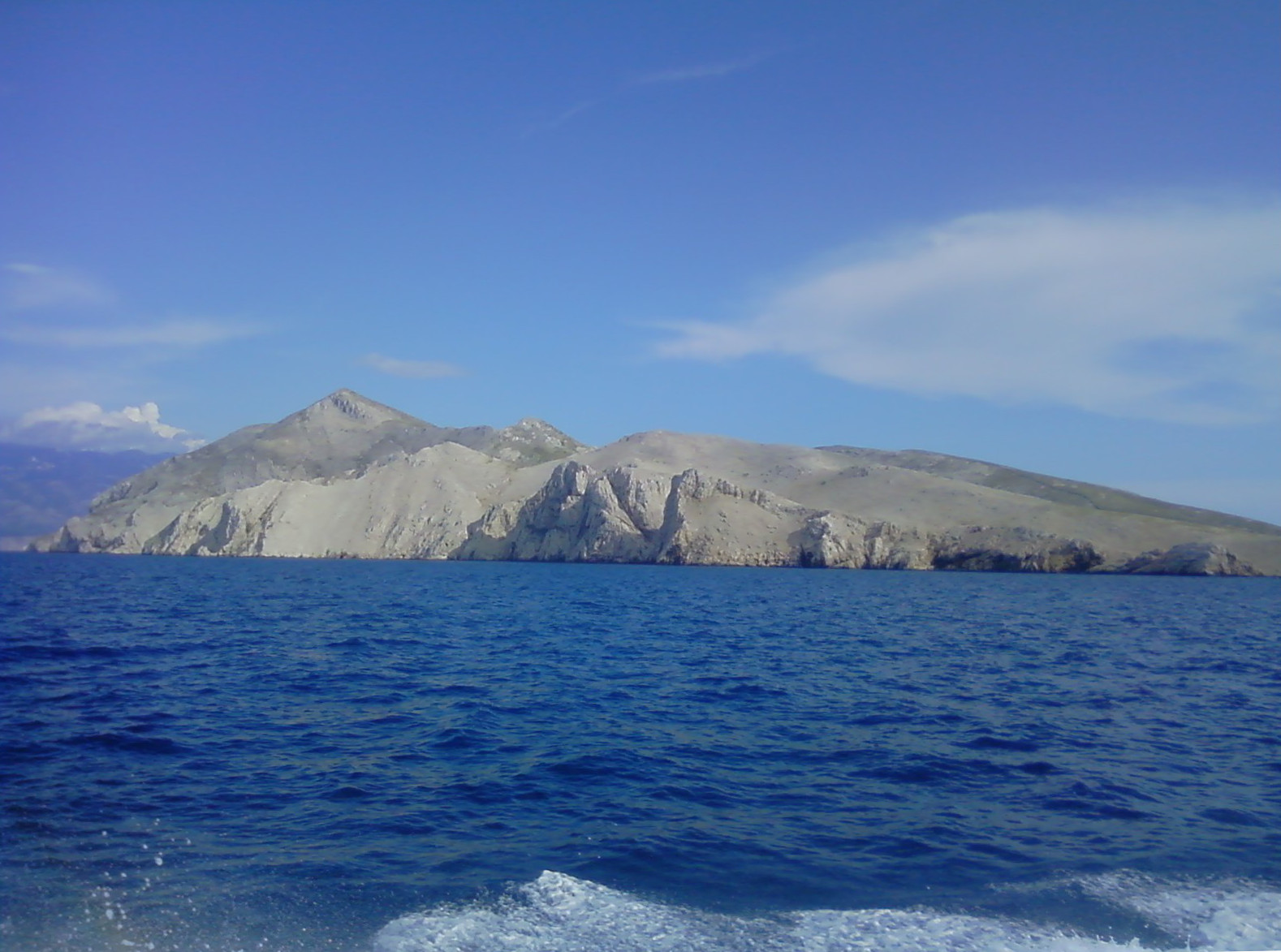 Otok Prvić kraj Krka sa sjeverozapadne strane